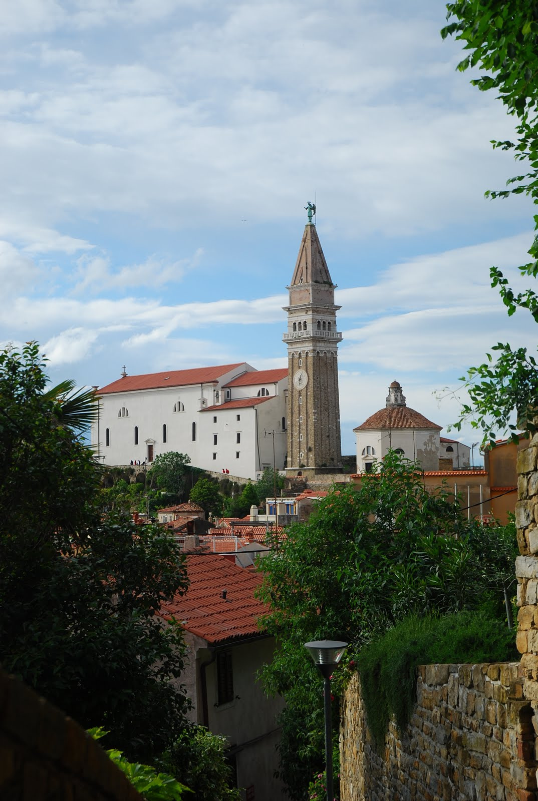 slovenia 2013